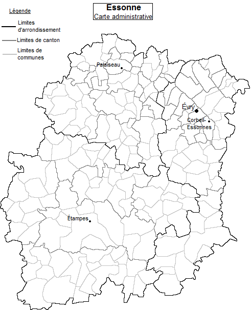 Carte de base des communes de l'Essonne